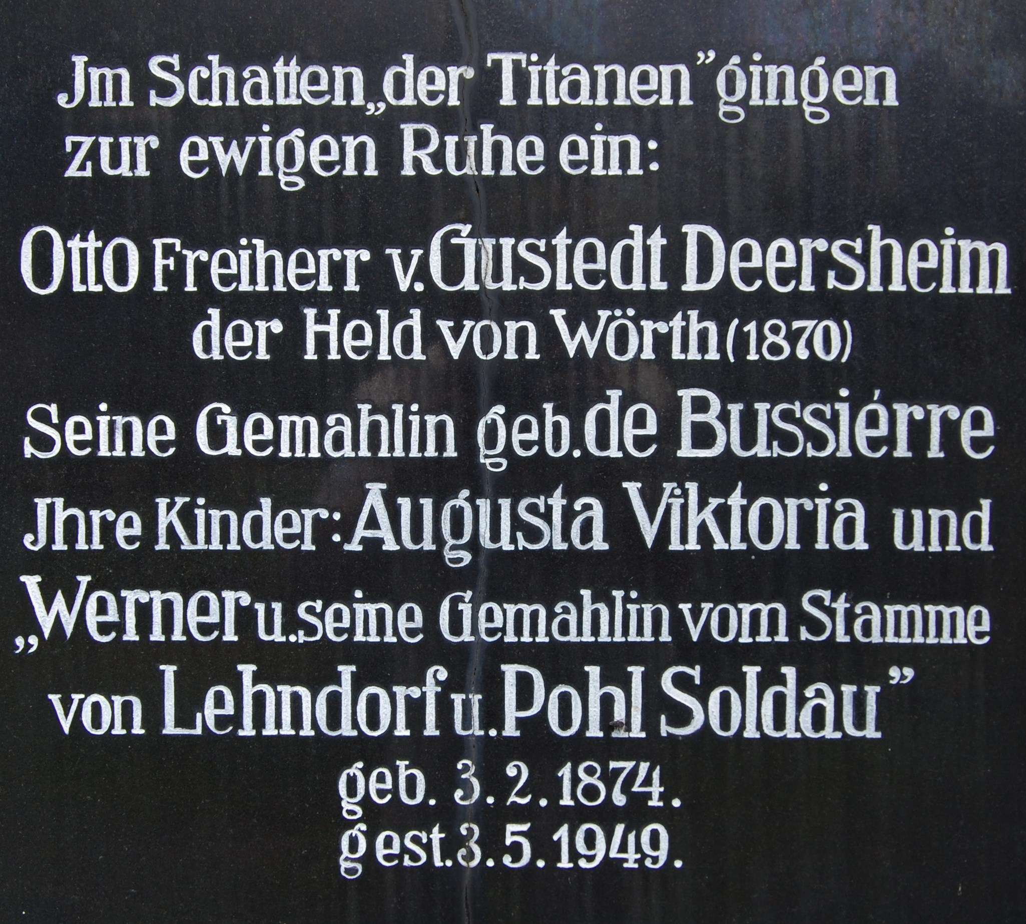 Gedenkstein-Inschrift für Otto von Gustedt-Deersheim (1839-1905) auf dem Kapellenfriedhof in Bad Kissingen